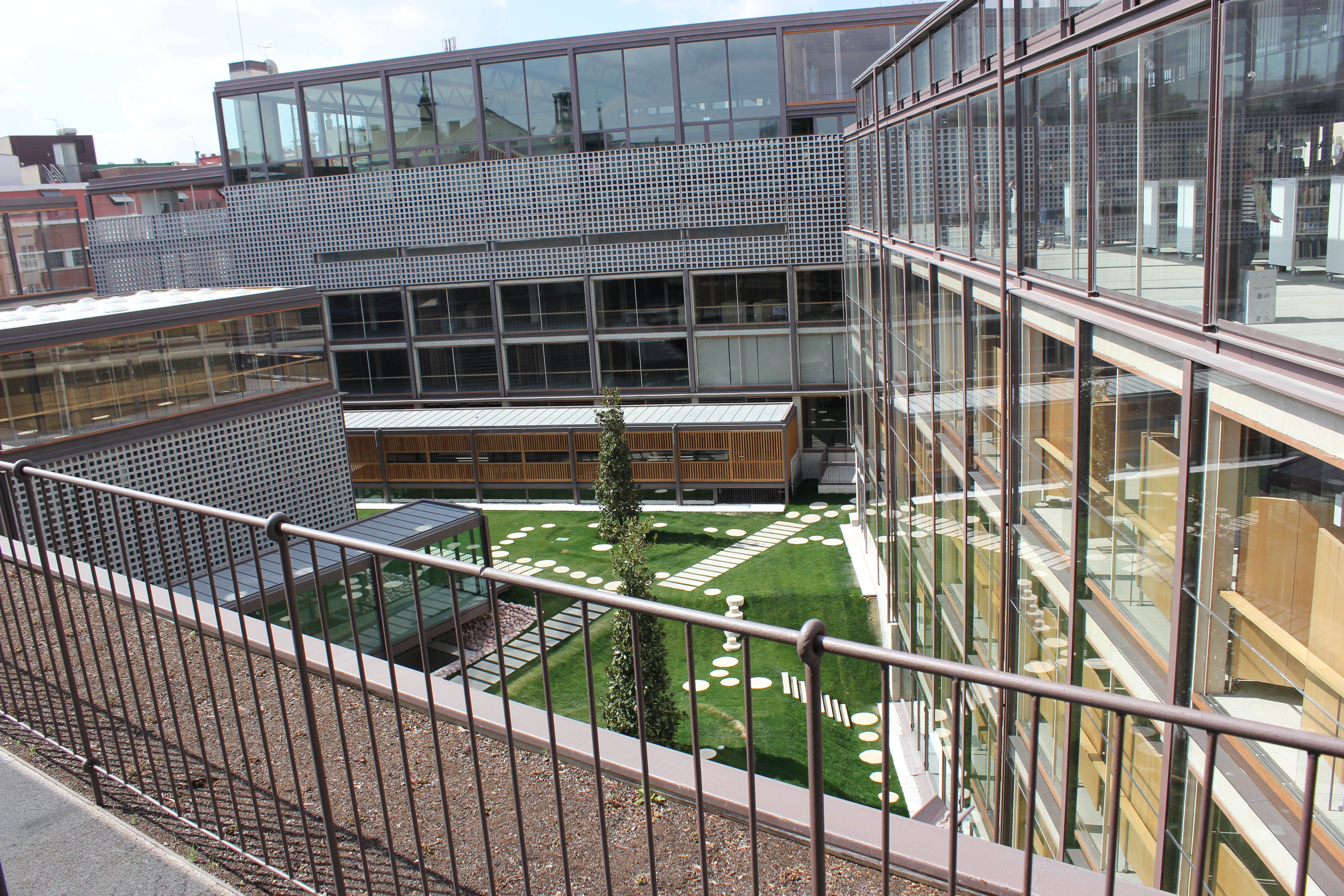 Nueva sede del Colegio Oficial de Arquitectos de Madrid.